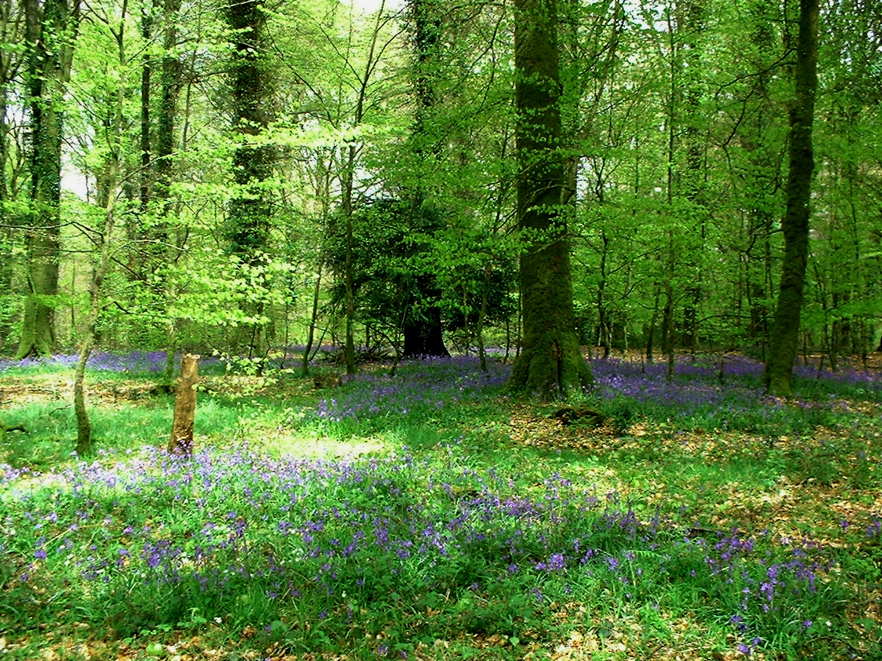 Bagnoles-de-l'Orne (Orne, France) : Forêt des Andaines.